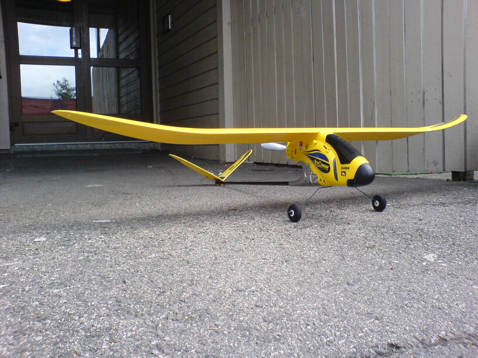 Dette er et nybegynnerfly med 3 kanaler. Altså throttle, høyderor, og sideror.